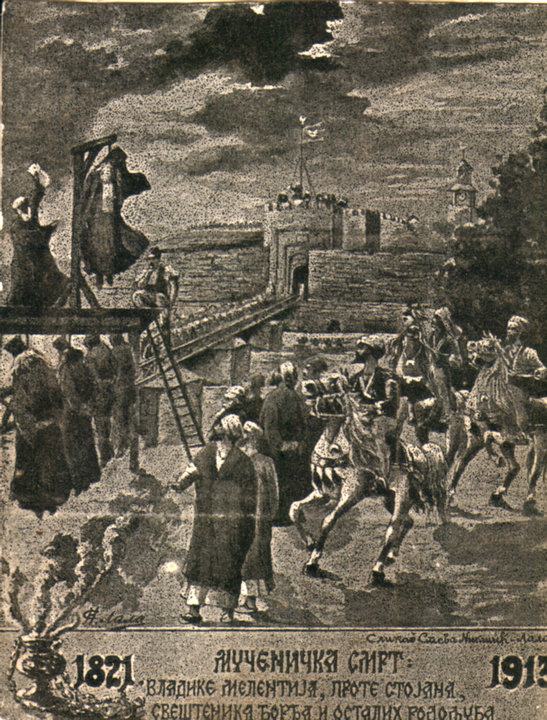 Plakat iz 1913. kada je postavljen spomenik obešenima 1821.